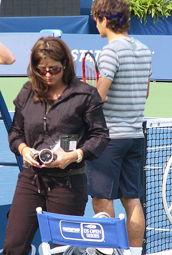 Roger_Mirka_0143